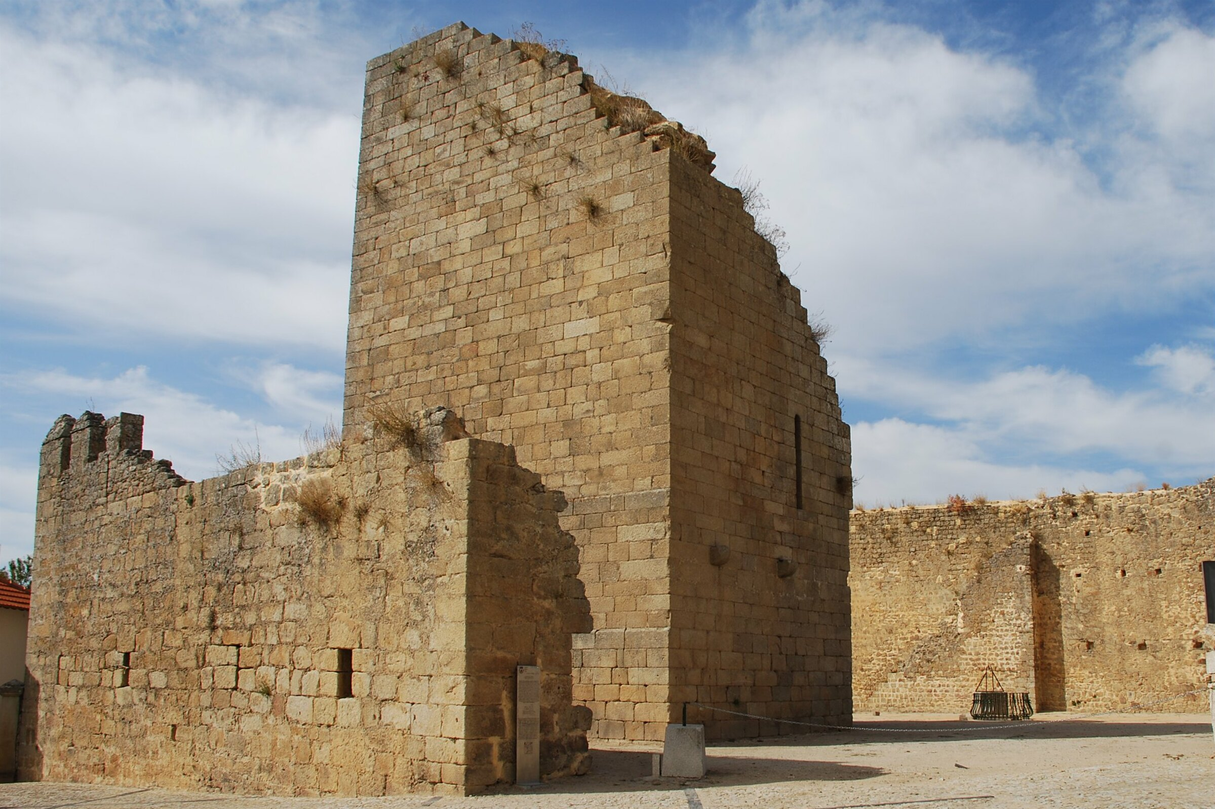 Castillo de Miranda do Douro